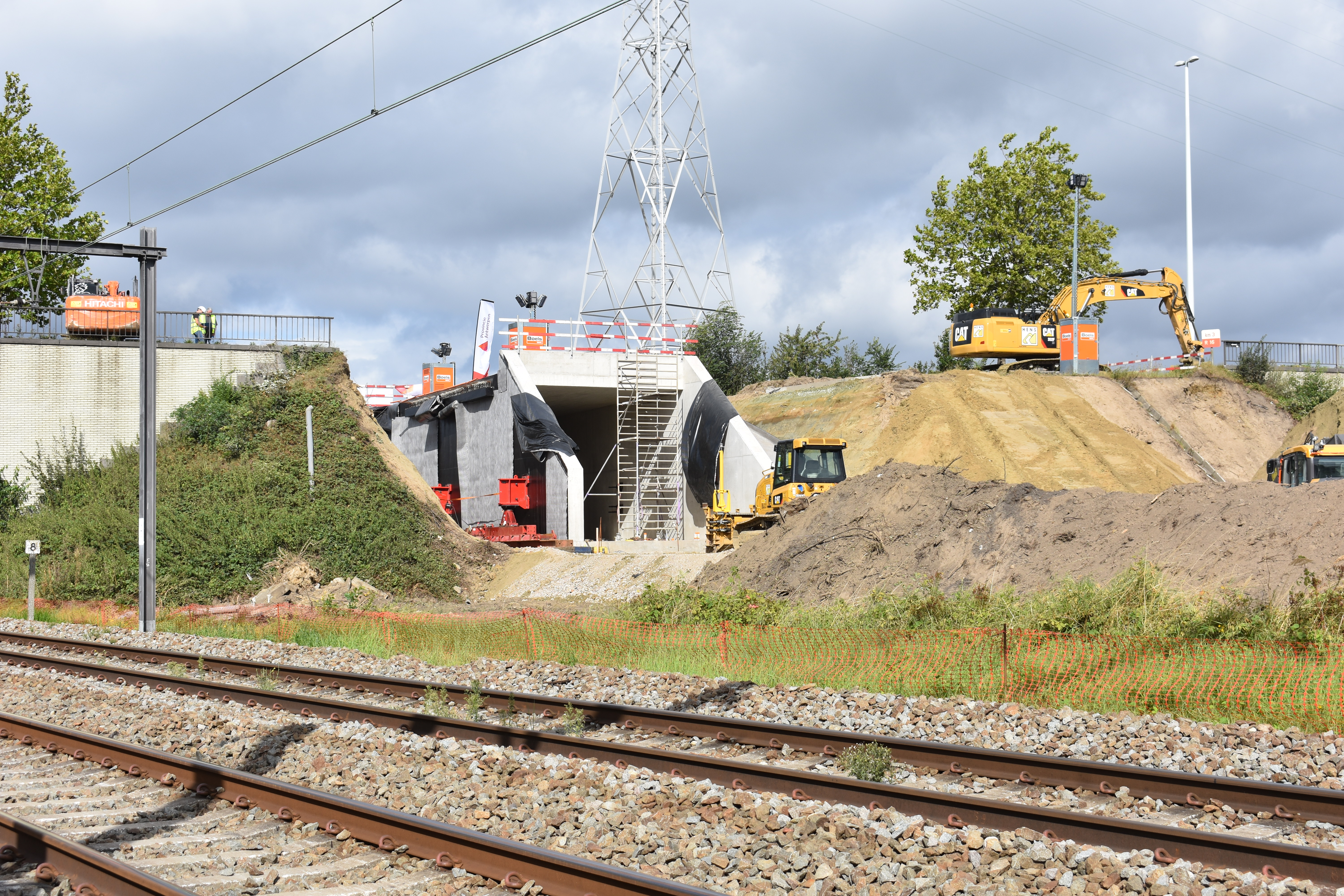 Tunnelkoker voor onderdoorgang Ring van Lier. De koker werd opgebouwd even ten westen van de ring, en op 20-21 augustus 2020 ingeschoven in een (uitgegraven) sleuf onder de ring van Lier.